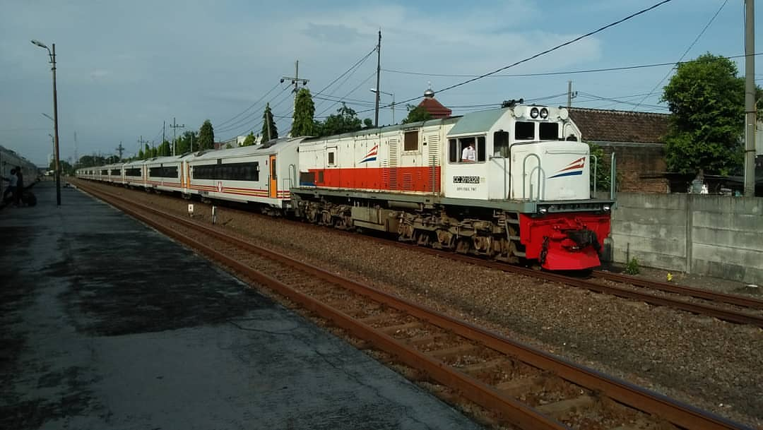 image:jayakarta premium at sepanjang.jpg